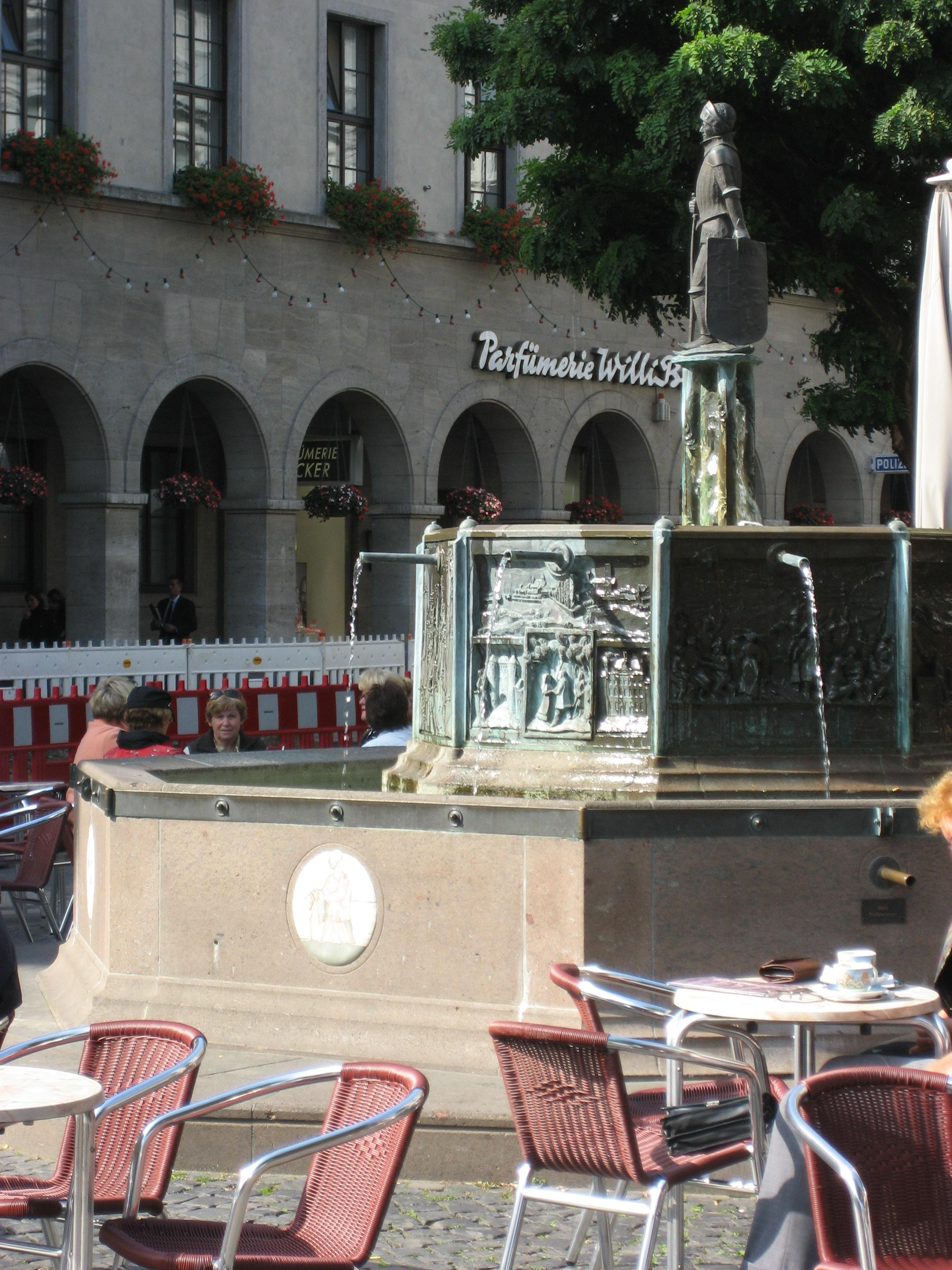 Das Foto zeigt die Hermann von Hessen-Statue oben auf dem Brunnen, der sich auf dem Neusser Marktplatz befindet. Links im Bild ist das Neusser Rathaus zu sehen.